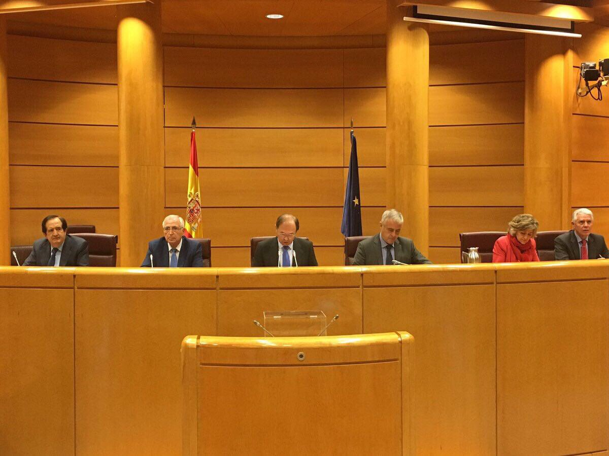 Juan José Imbroda nombrado vicepresidente de la Comisión Especial del Senado